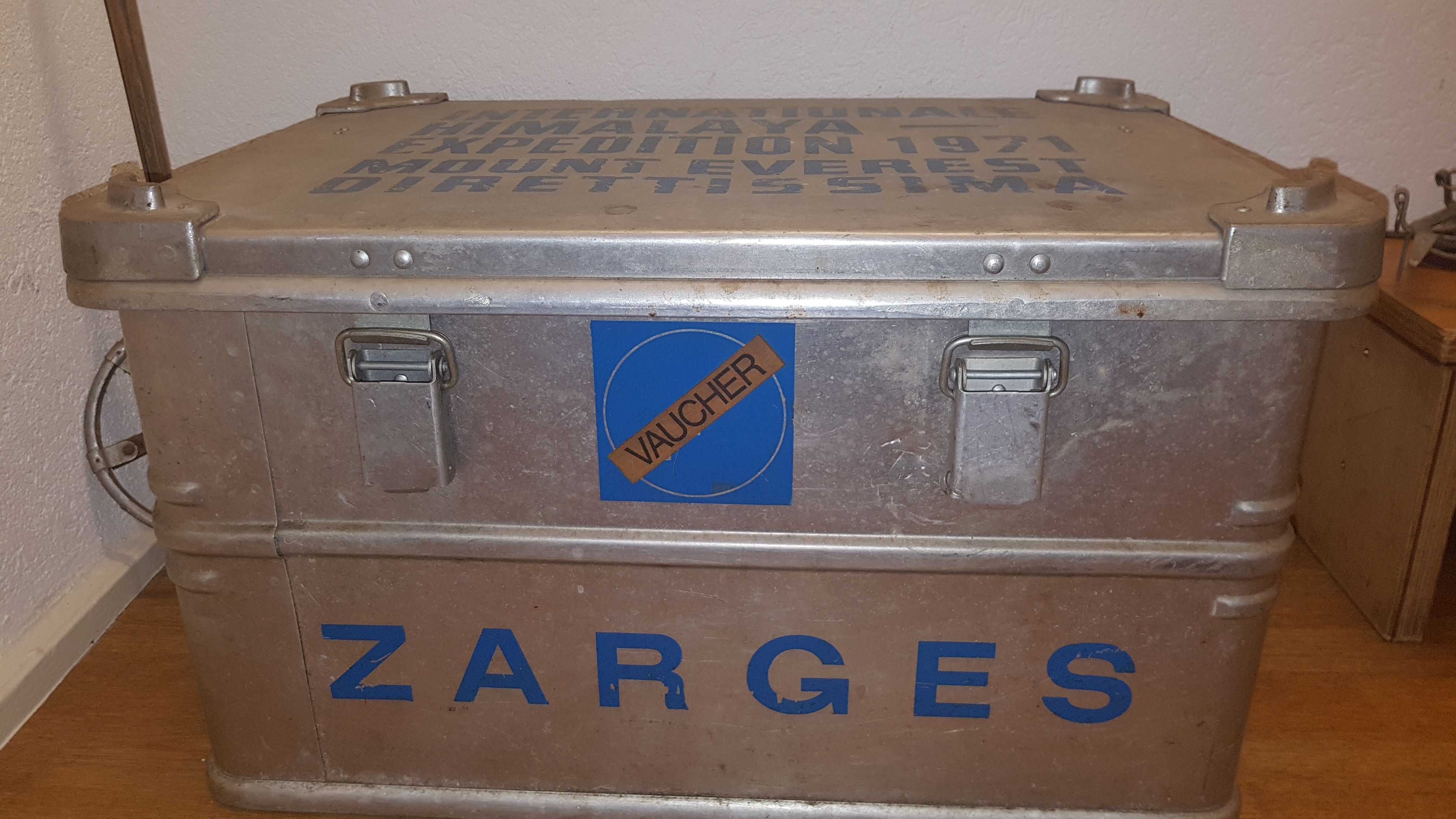 Malle de l'expédition Himalaya de 1971